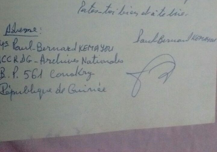 Signature de Paul-Bernard Kemayou, 12ème Roi de Bangou, homme politique et résistant anticolonialiste camerounais, alors en service aux Archives Nationales de la République de Guinée.